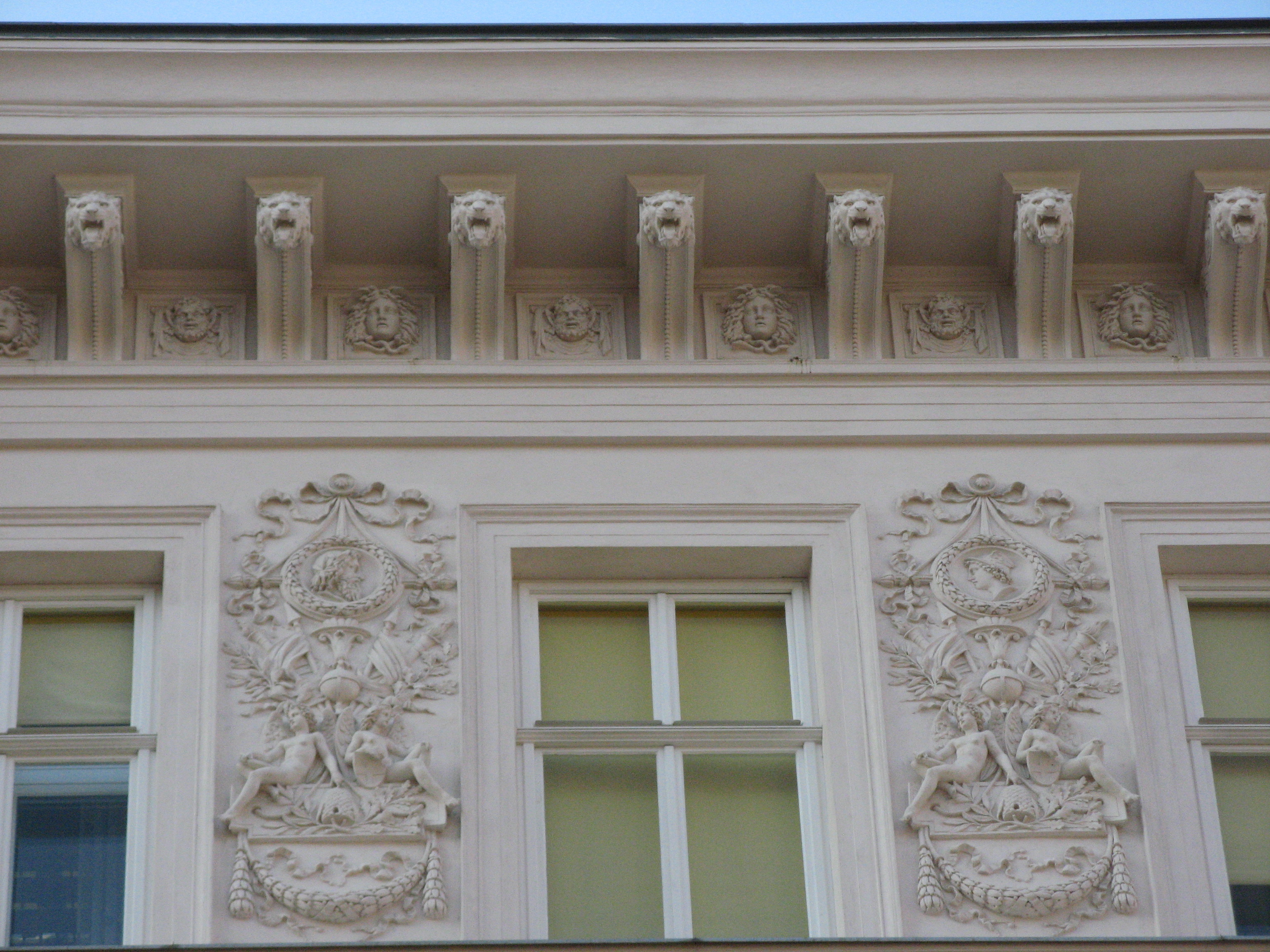 Detail vom Haus Doblhoffgasse 6, Wien-Innere Stadt